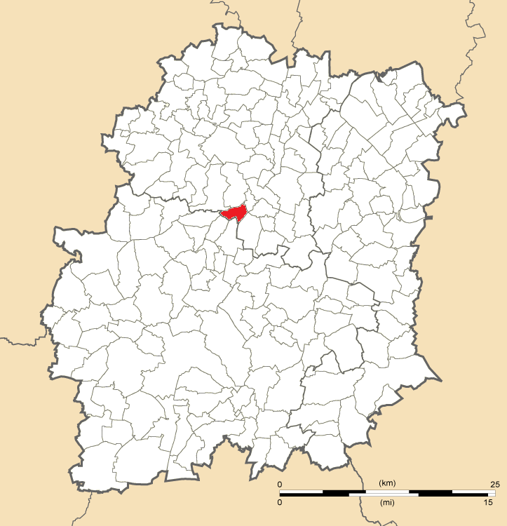 Carte de position d'Égly en Essonne (91)